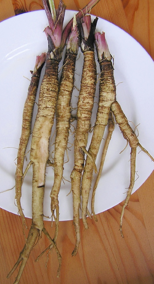 Wurzeln von Arctium lappa aus dem eigenen Garten. Im Japanischen gobo genannt.